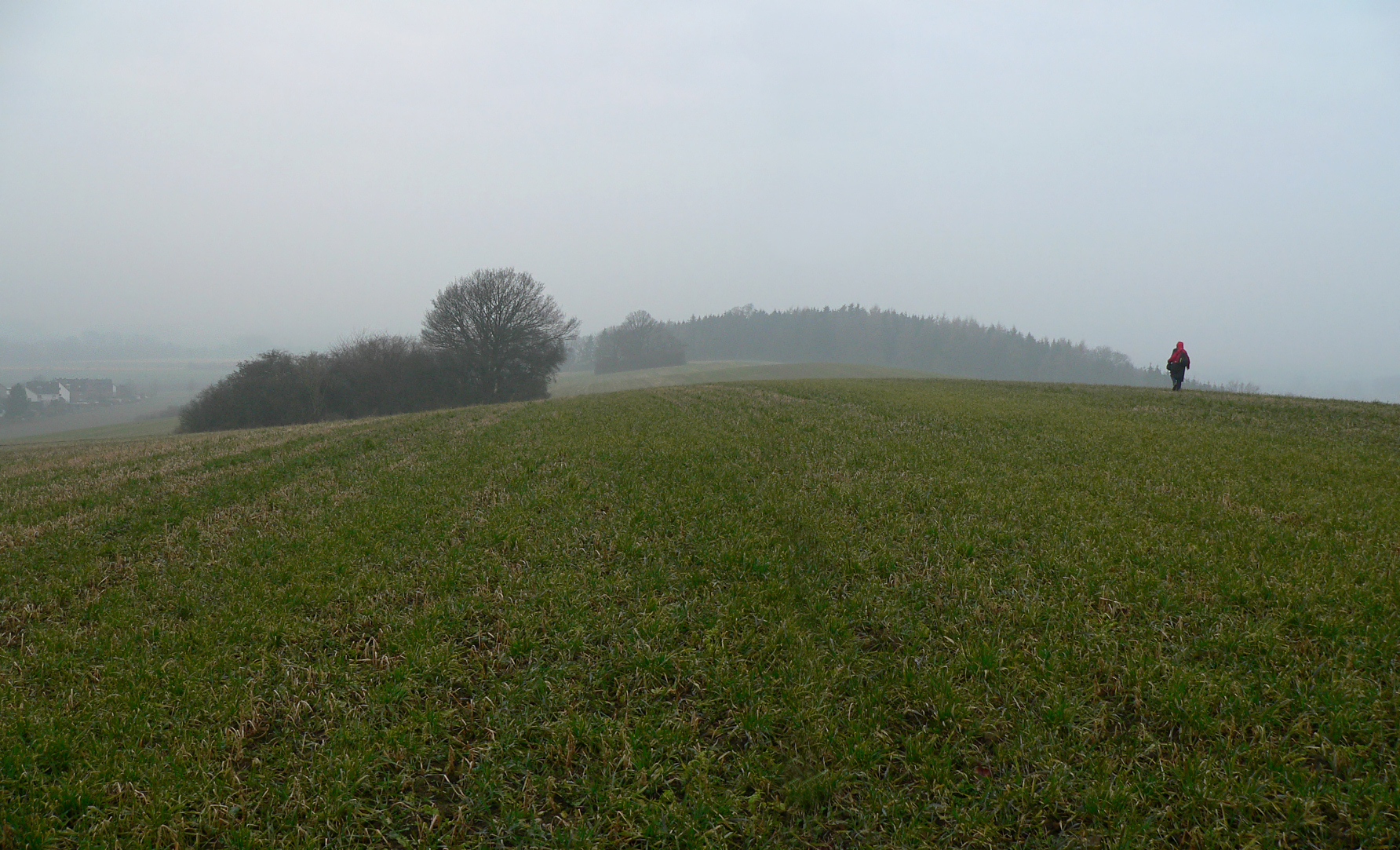 Kamm des Stemmer Berges, links Stemmen